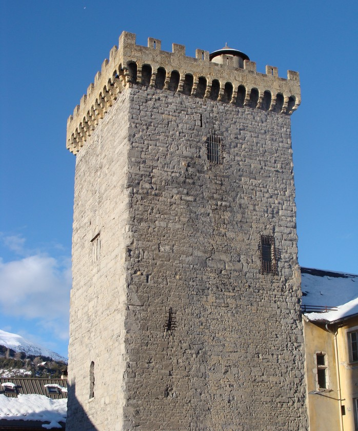 ERmbrun (Hautes-Alpes) : la Tour Brune